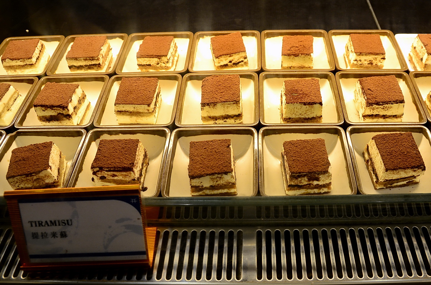 Tiramisu at Jogoya, September 2011